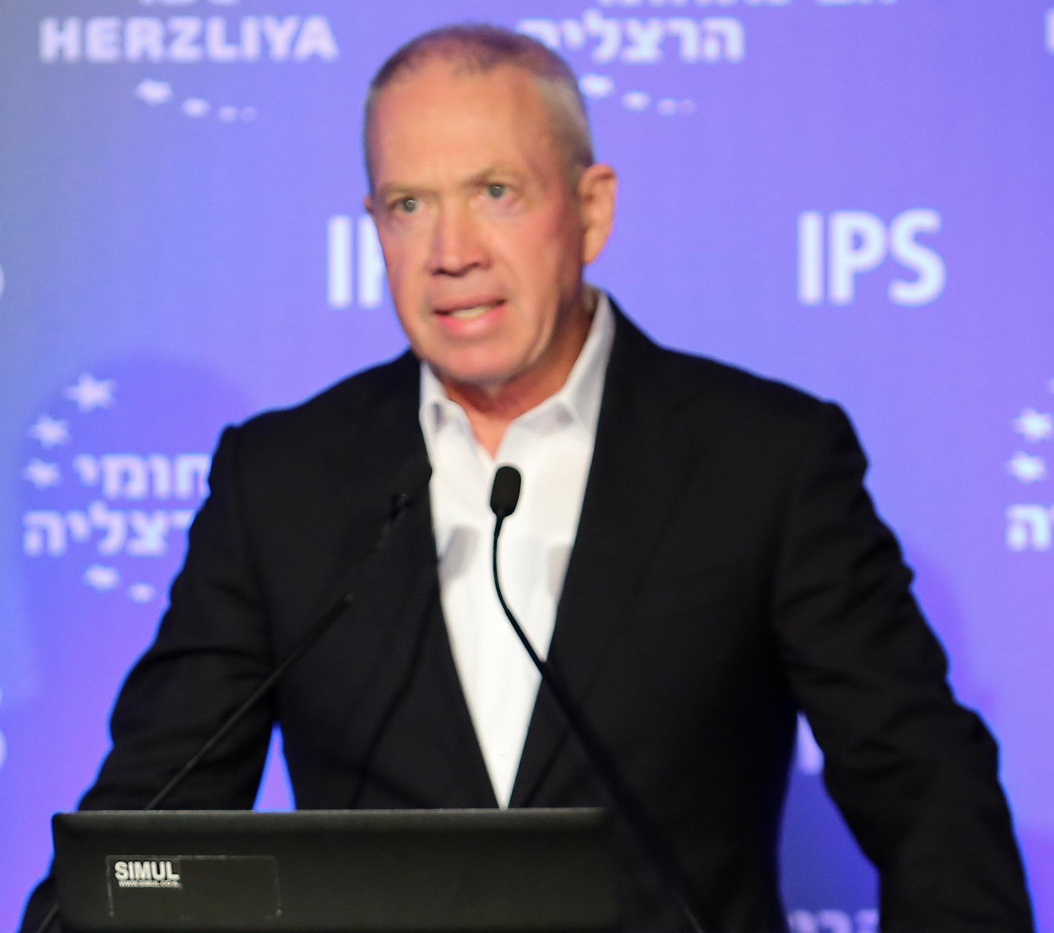 יואב גלנט בכנס הרצליה 2016 של המכון למדיניות ואסטרטגיה במרכז הבינתחומי הרצליה